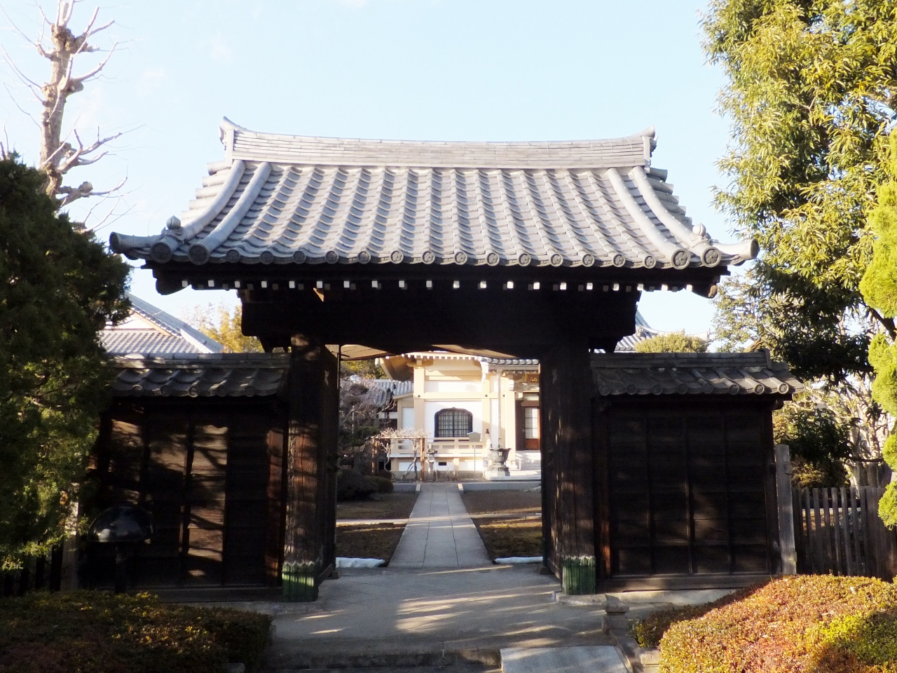 大乗院山門